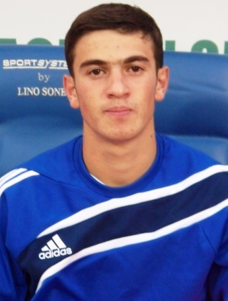 футболист Гара Гараев (Азербайджан)